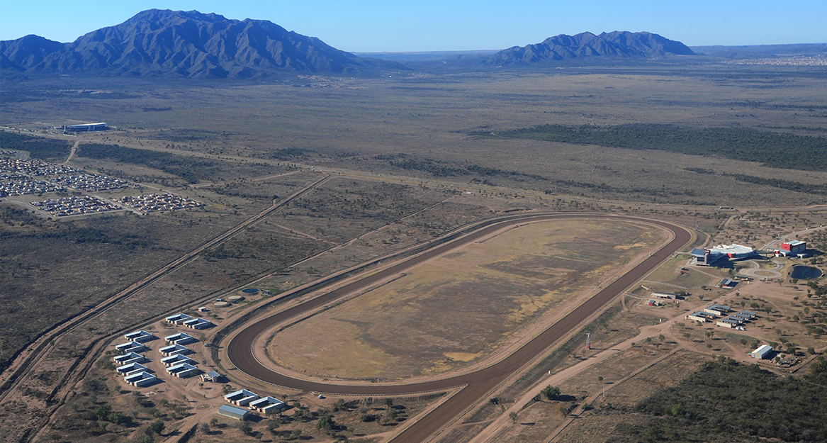 hipodromo la punta